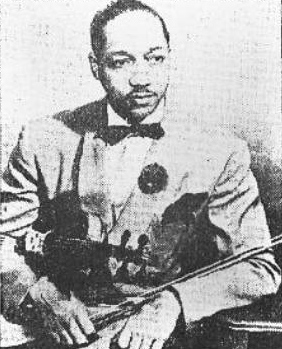 Count Basie advertisement